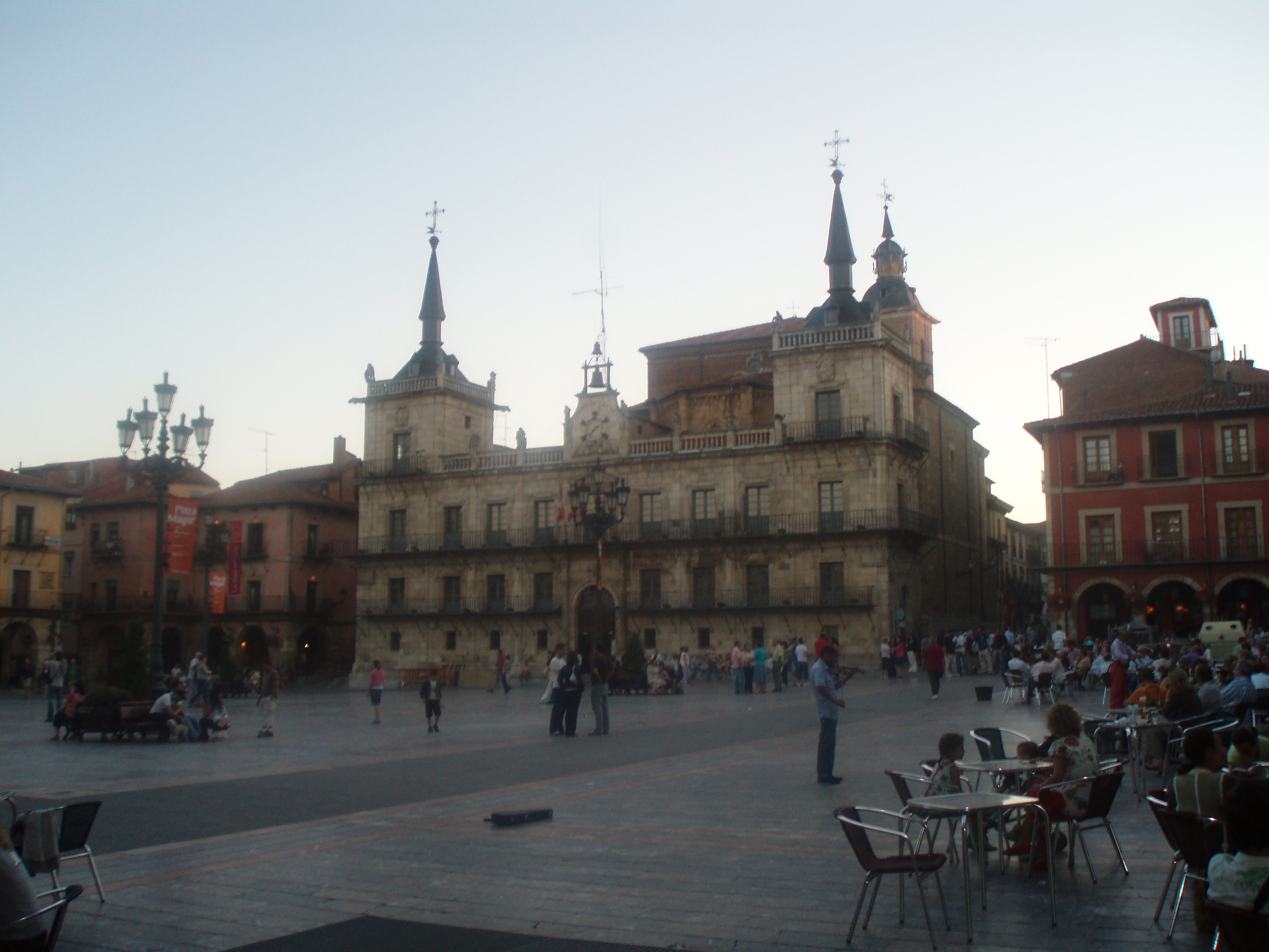 Vista de la Plaza Mayor de León, con el Ayto. de la ciudad.